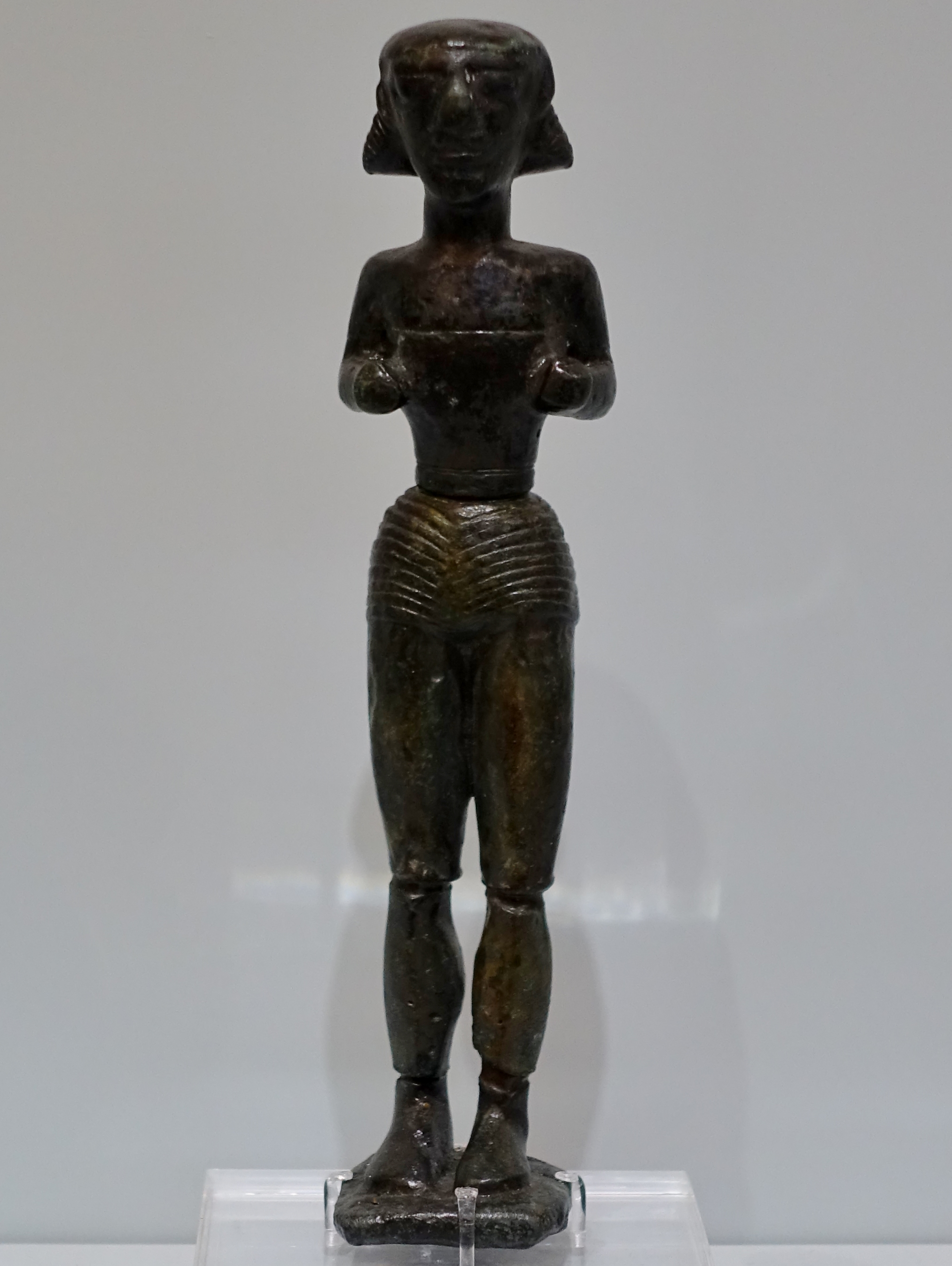 Bronzefigurine (10.–6 Jahrhundert v. Chr.), gefunden im Heiligtum des Hermes und der Aphrodite bei Symi, Archäologisches Museum von Iraklio, Kreta, Griechenland